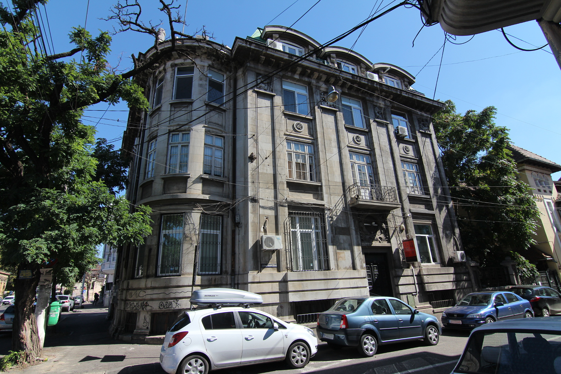 Imobil pe Calea Călărașilor